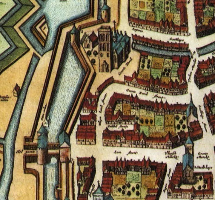 Gedeelte van De plattegrond van Velo uit 1652 van Blaeu met stadstoren en helpoort